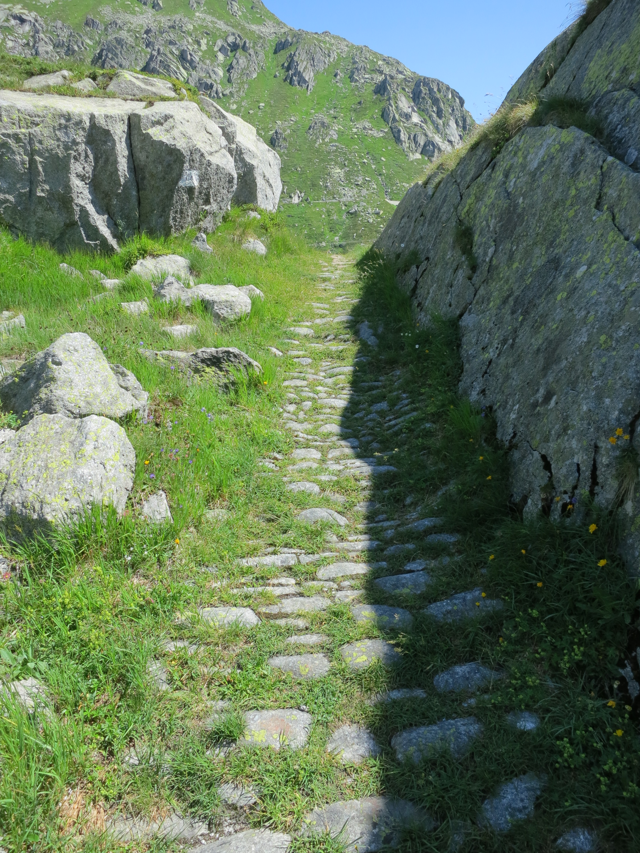 Saumweg, Gotthardpass, Airolo TI, Schweiz